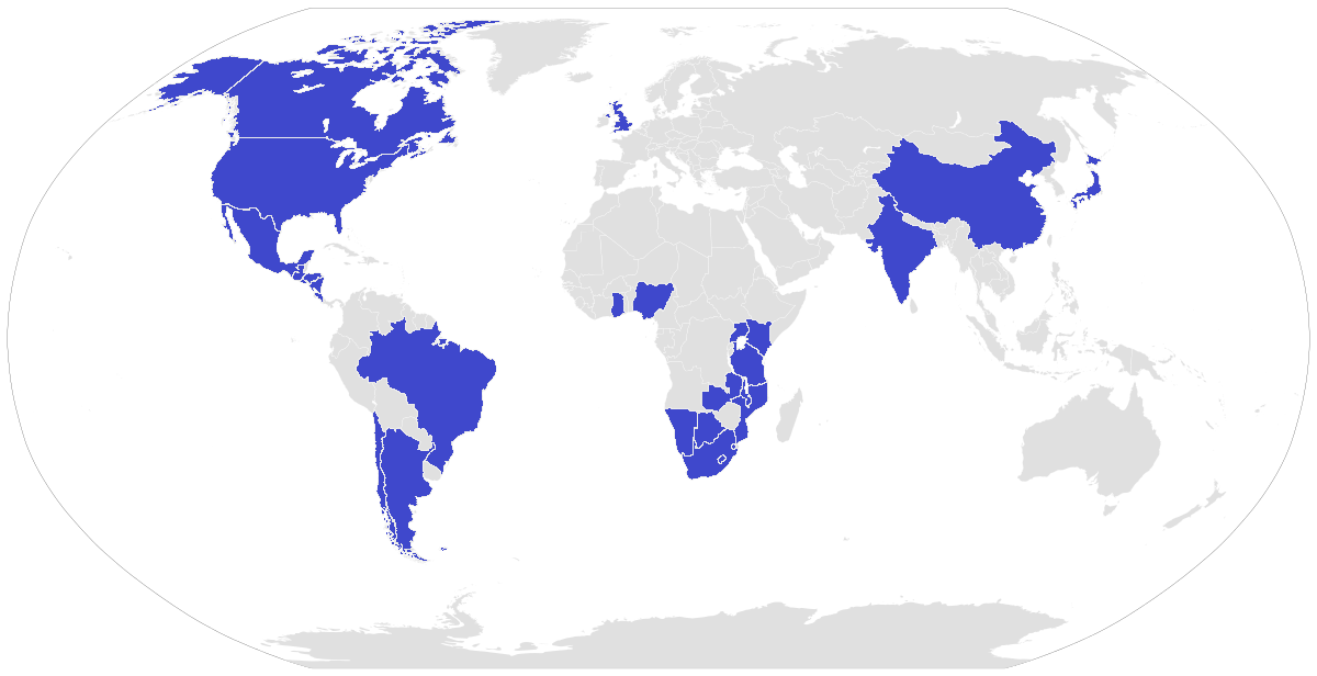 Карта світу із виділеними країнами, у яких є хочаб 1 магазин Walmart